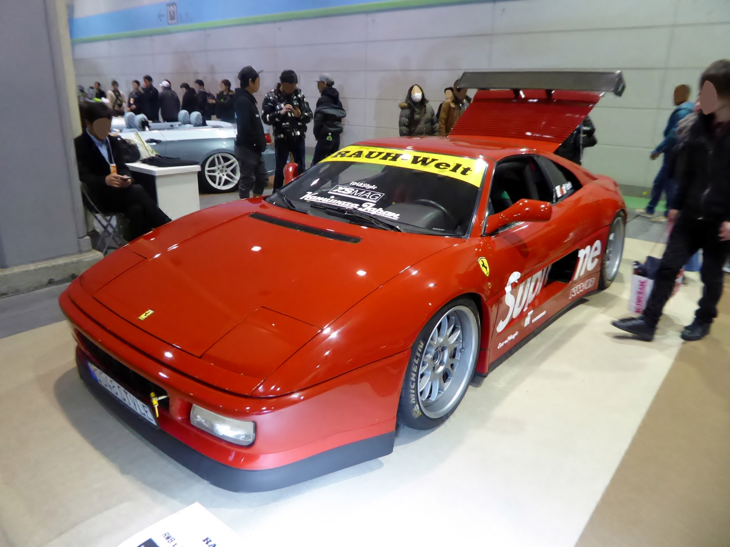 大阪オートメッセ2017に於いてRWB Ferrari 348を撮影。